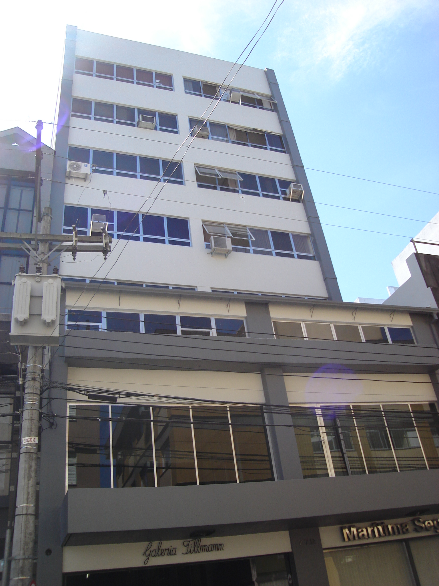 Galeria Tillmann, em Pelotas, RS.